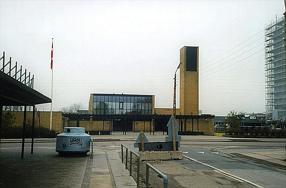 Strandmarkskirken, Strandmarks Sogn, Hvidovre Kommune